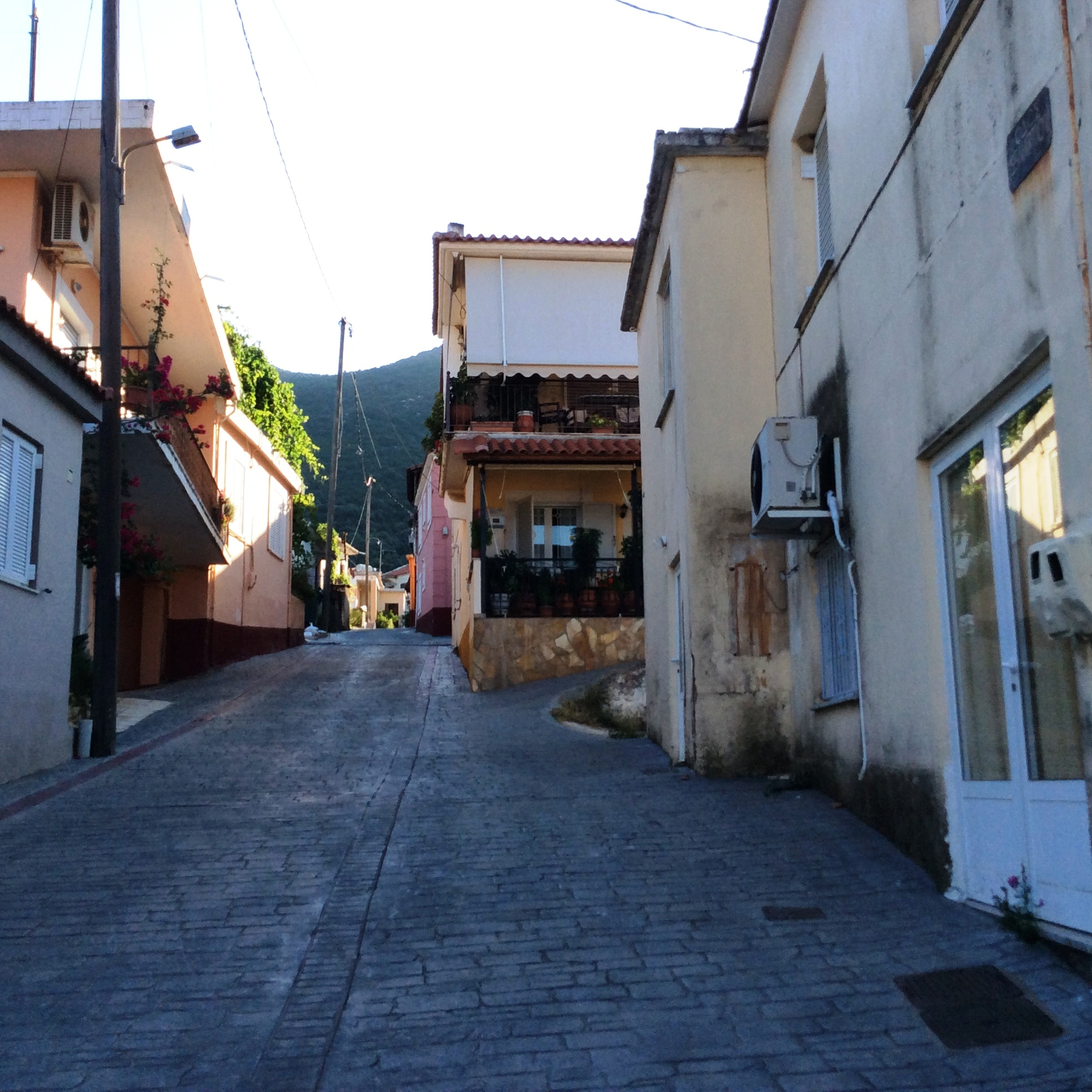 Μουζάκι Μεσσηνίας.